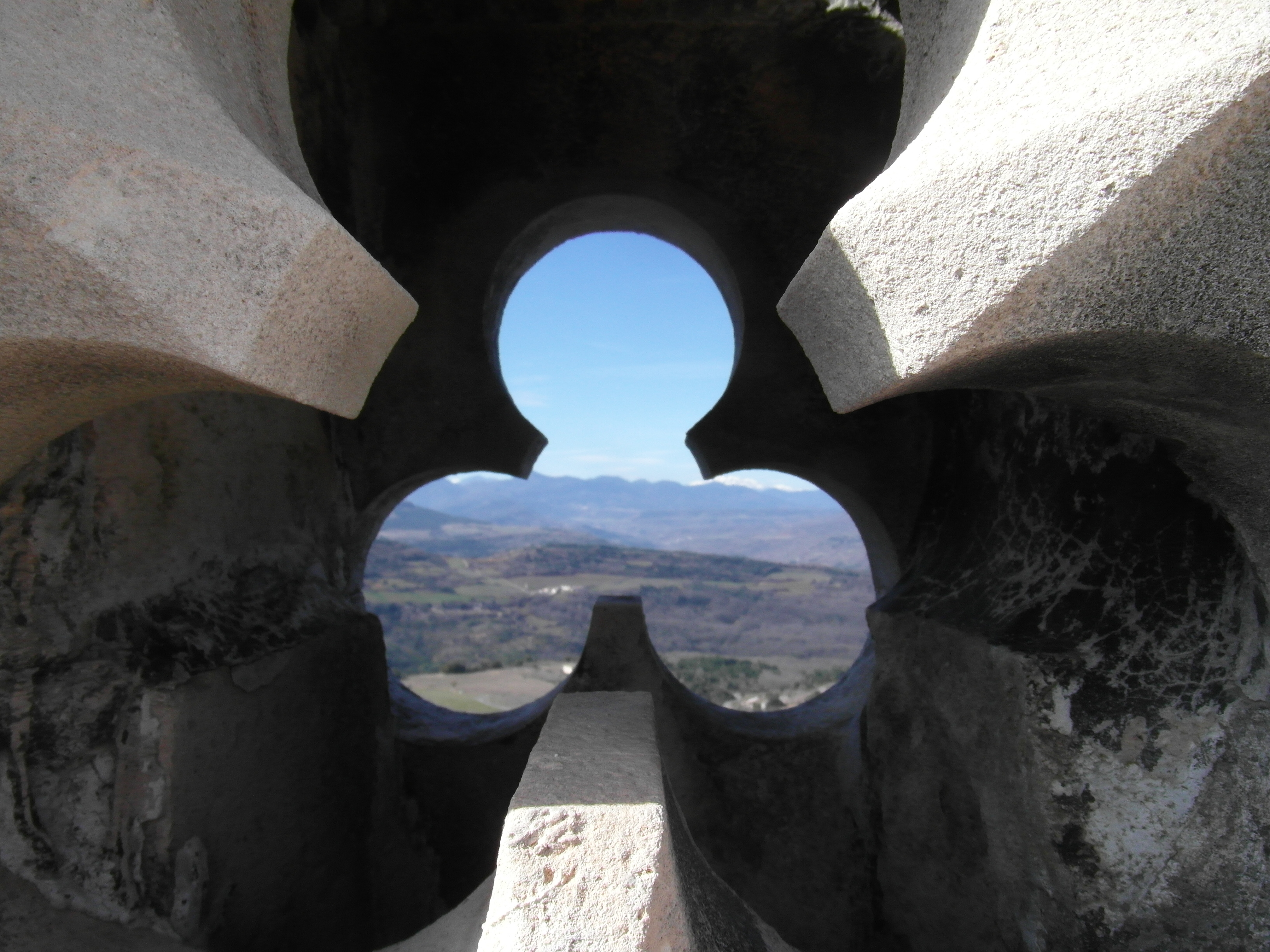 Décoration extérieure de la Tour Magdala